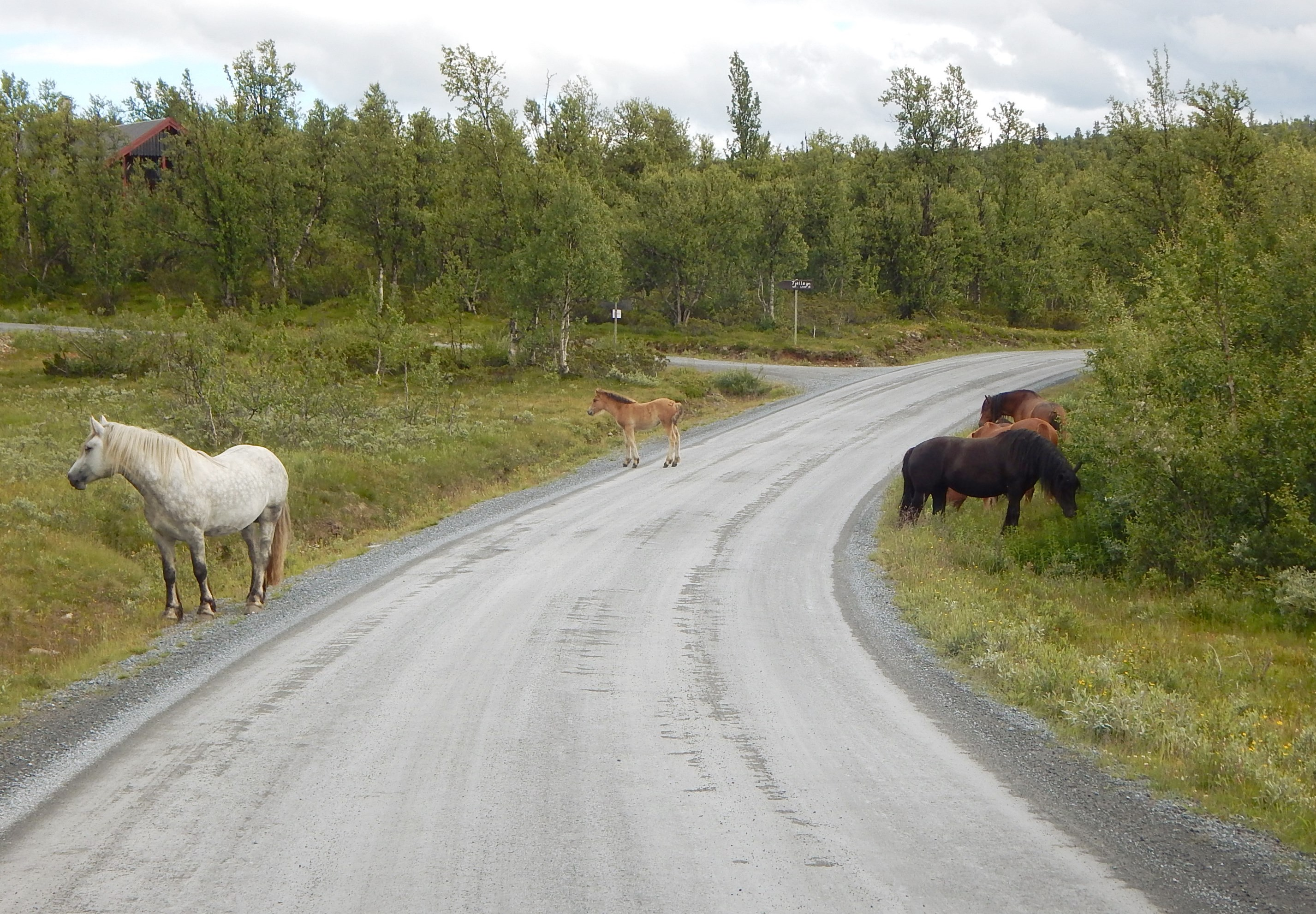 Hester langs FV2442 (tidl. FV204), sør for Lenningen i Etnedal